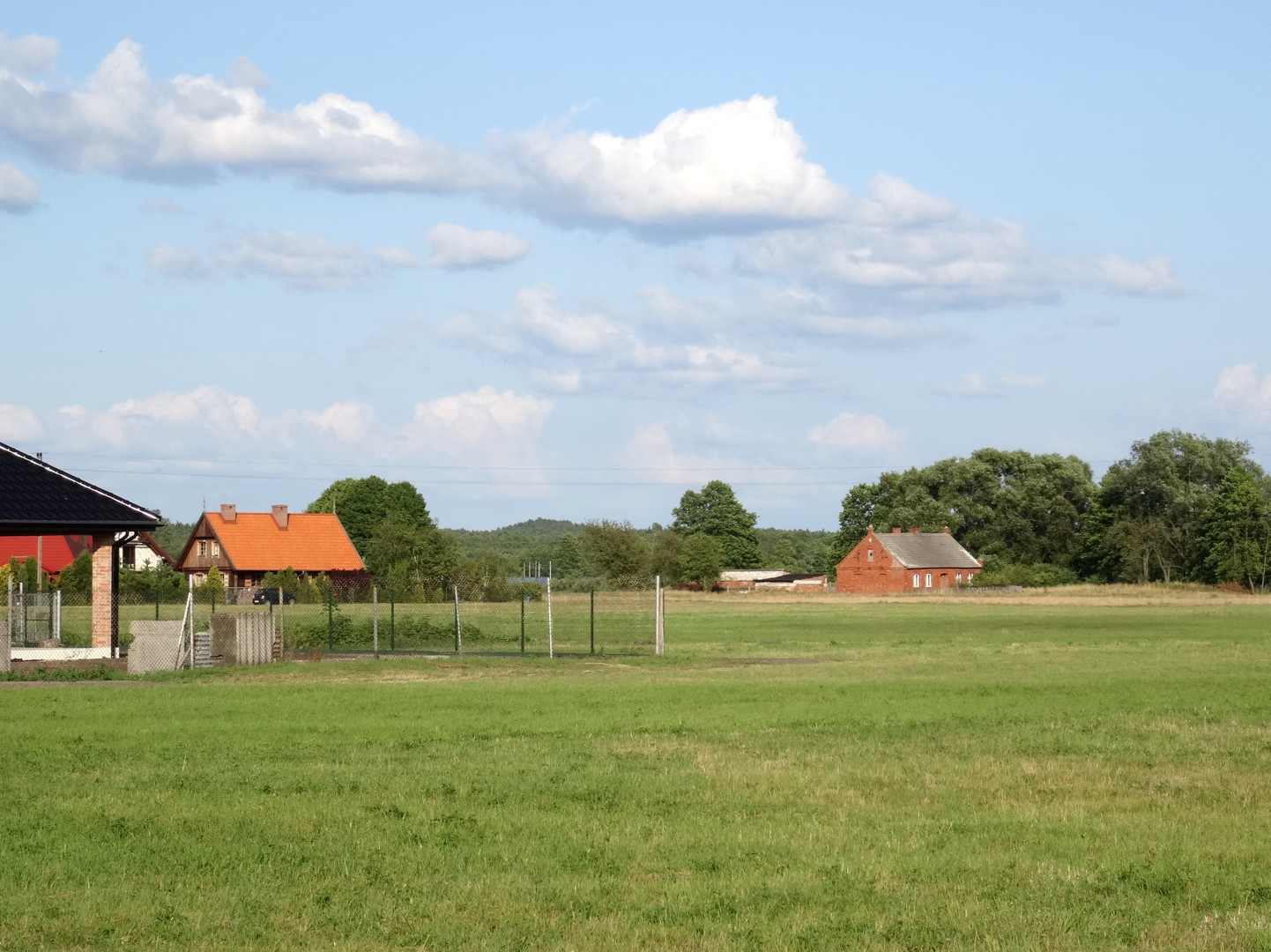 Prądocin, gmina Nowa Wieś Wielka, powiat bydgoski